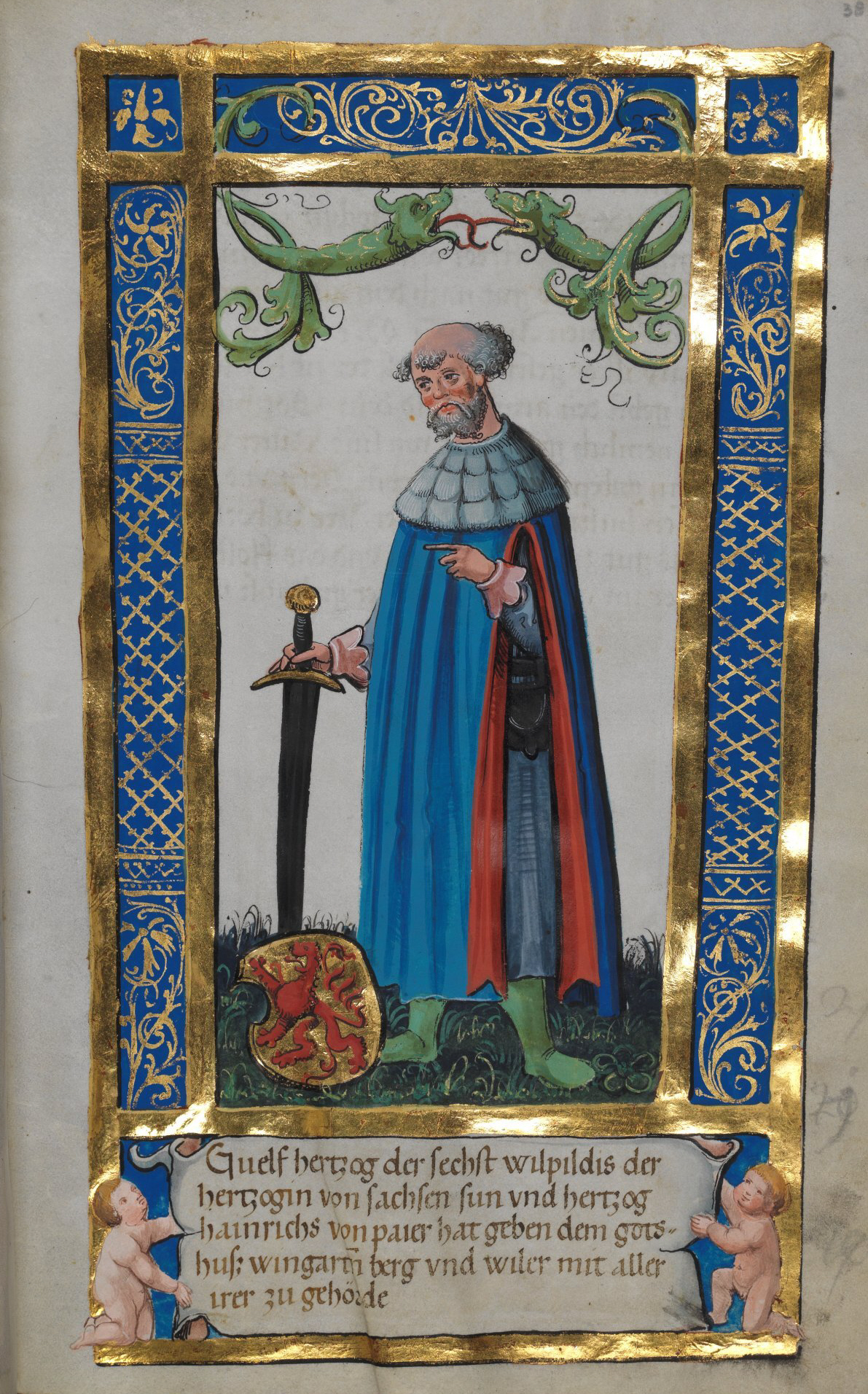 Weingartener Stifterbüchlein, Württembergische Landesbibliothek Stuttgart, Cod.hist.qt.584, fol. 38r, Stifterbild Welf VI. Guelf hertzog der sechst wilpildis der hertzogin von sachsen sun vnd hertzog hainrichs von paier hat geben dem gotshuß wingarten berg vnd wiler mit aller irer zugehörde